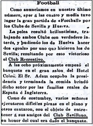 Diario La Provincia aludiendo al Club Recreativo y al Club inglés de Sevilla